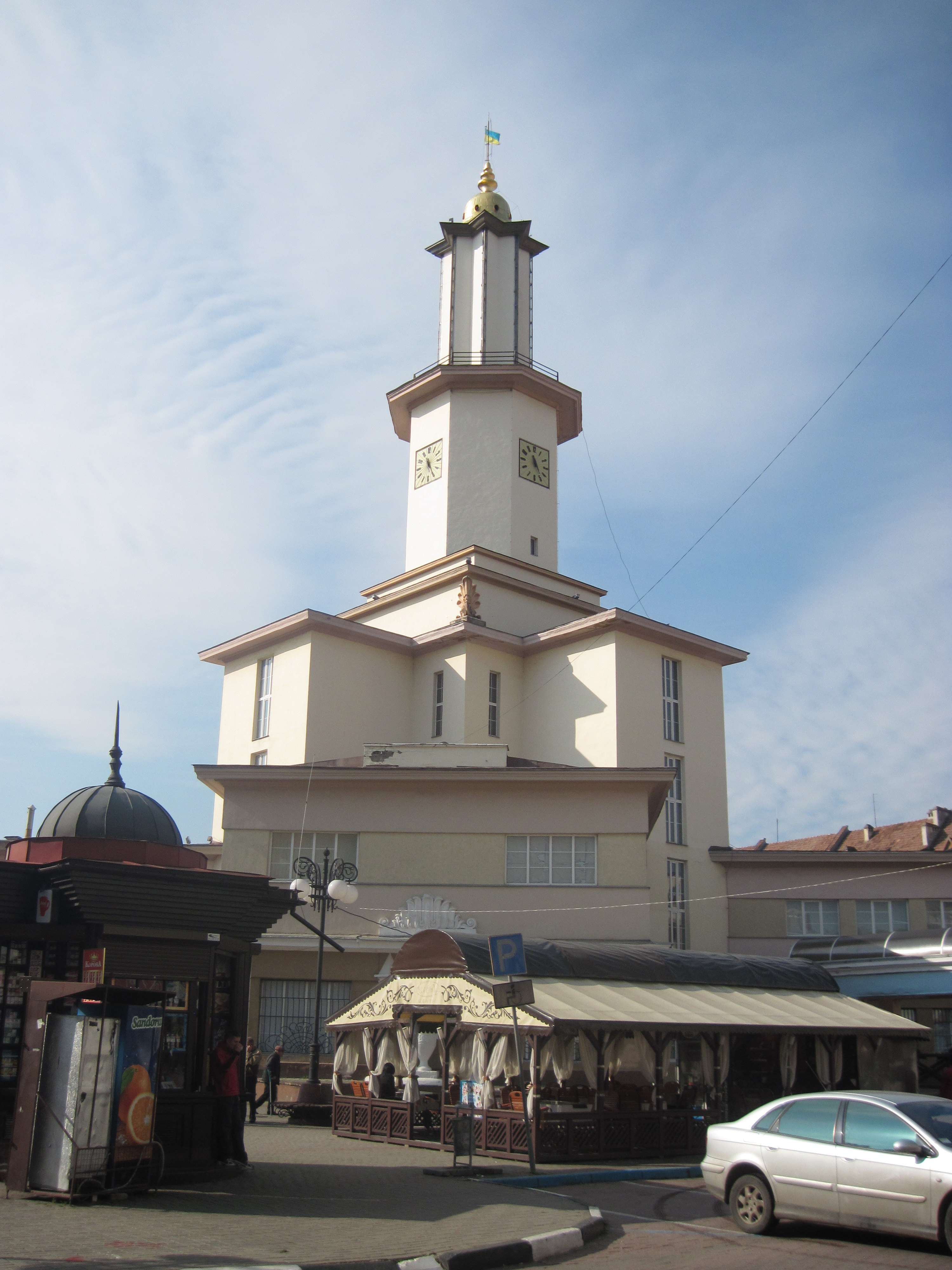 Ратуша, Франківск